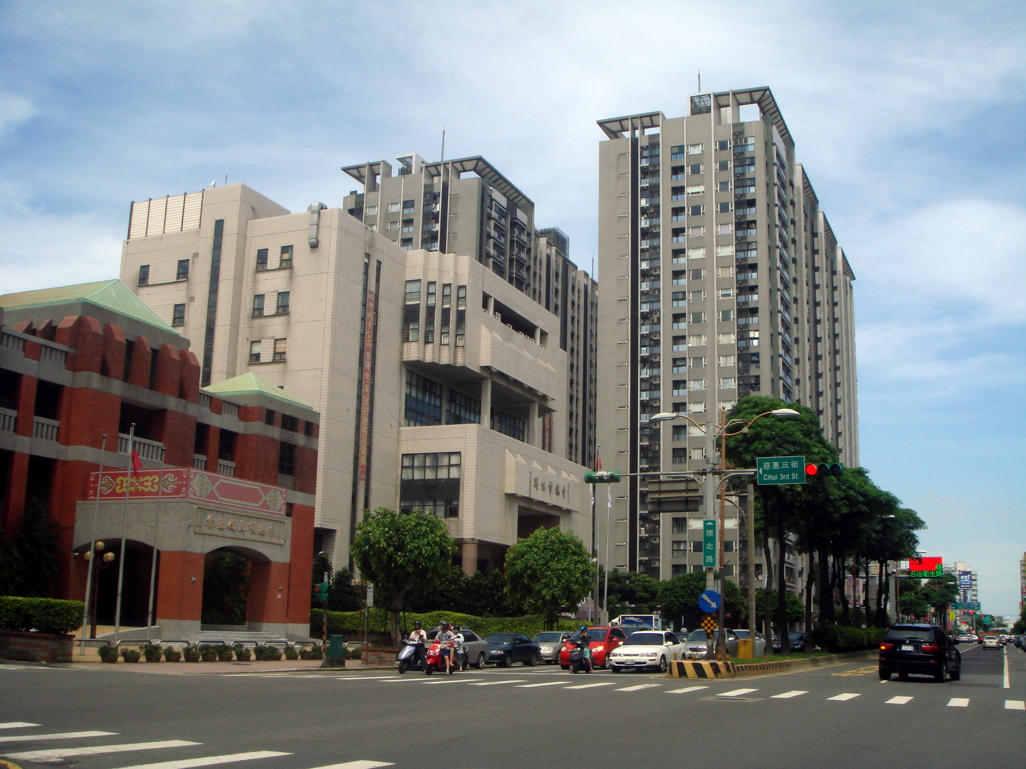 中文（台灣）: 位於桃園縣中壢市環北路的中壢市民代表會、中壢市公所、商業住宅區